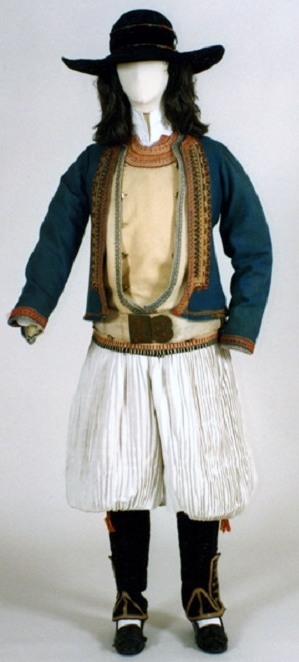 Homme de Ploaré vers 1850 (Musée breton, Quimper)